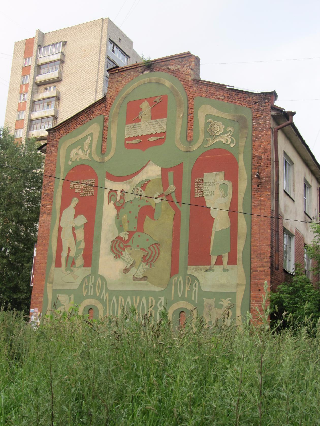 Панно на доме в Рыбинске